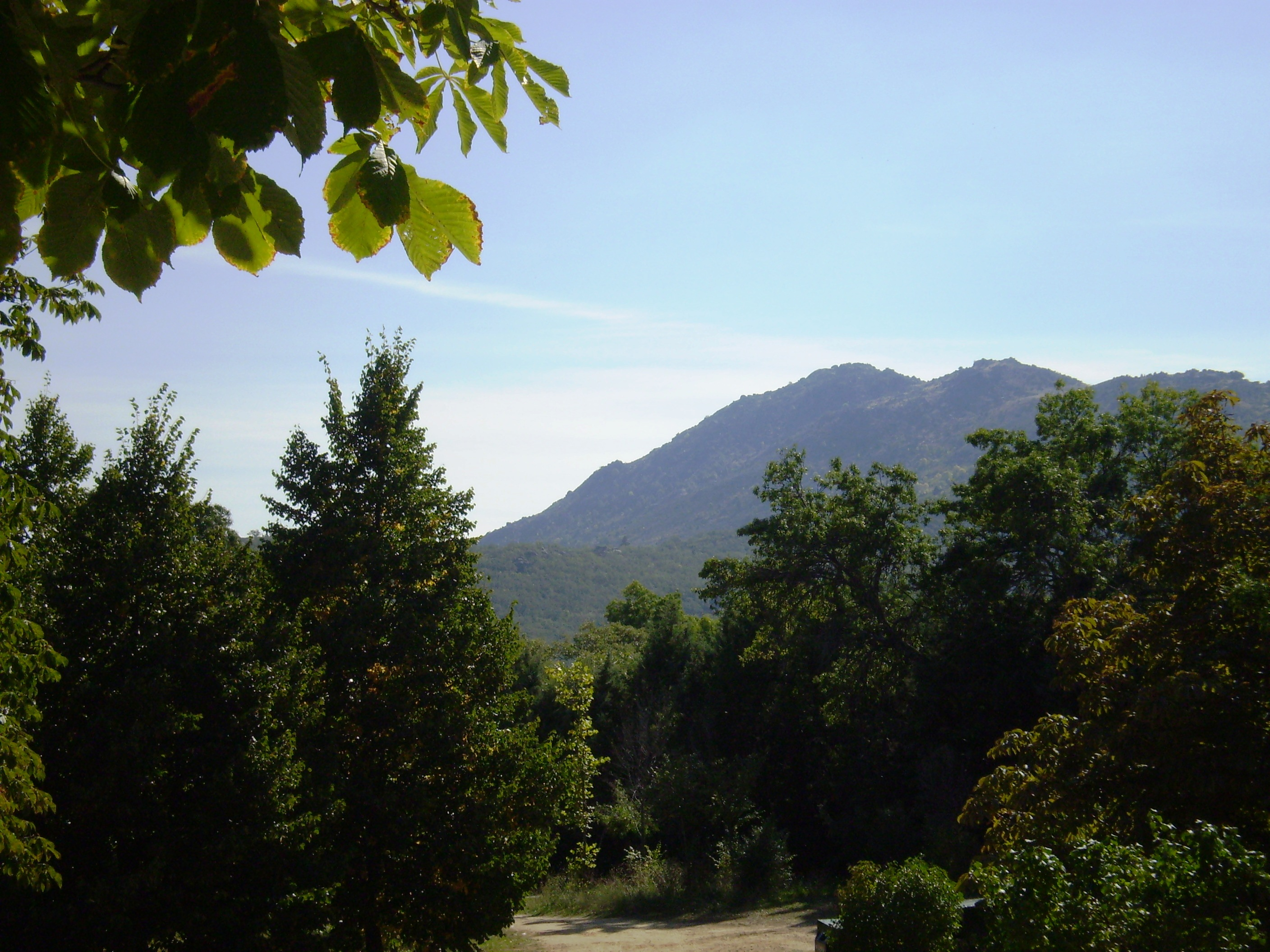 Paraje Pintoresco del Pinar de Abantos y Zona de La Herrería. San Lorenzo de El Escorial. Community of Madrid, Spain